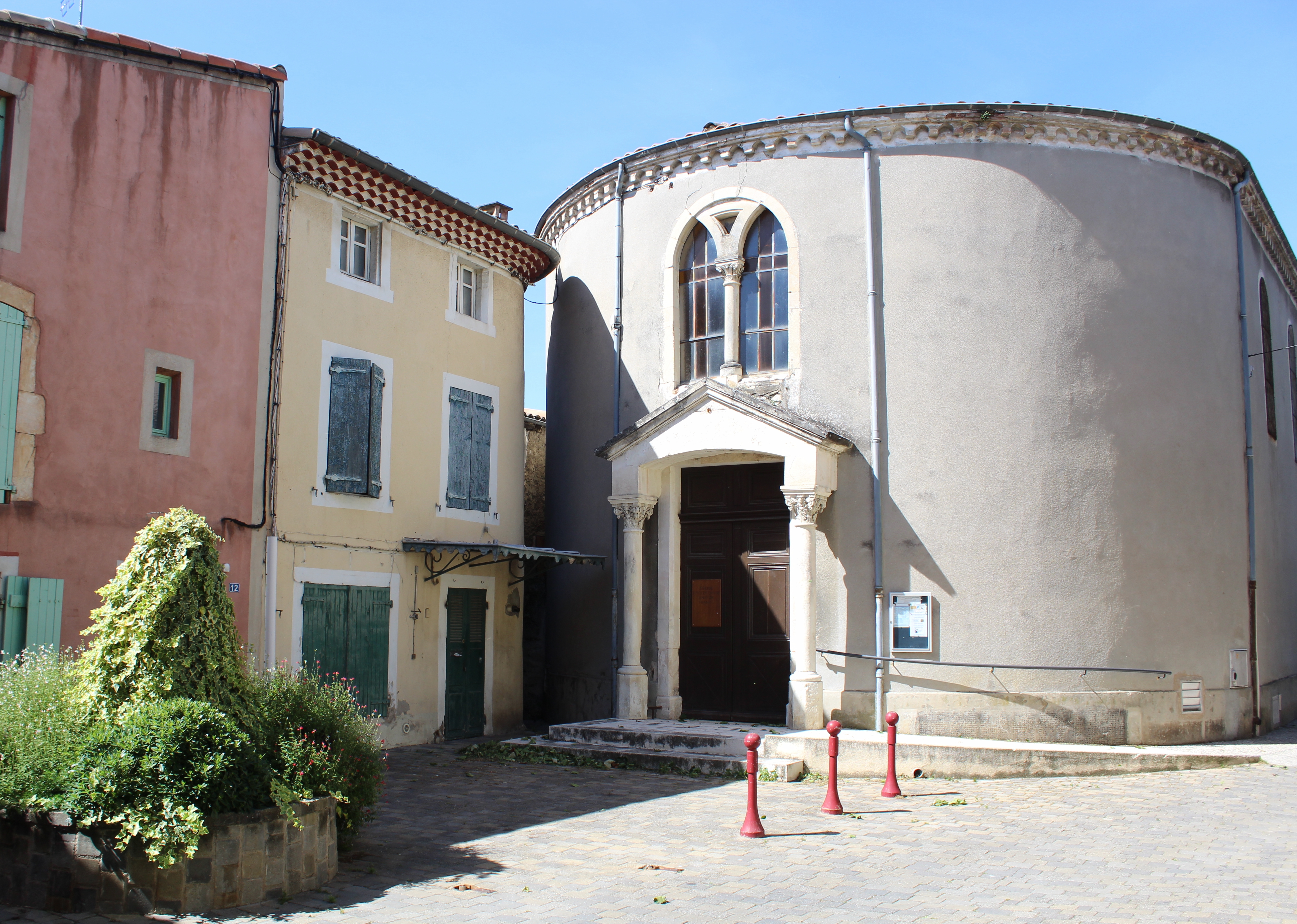 le temple